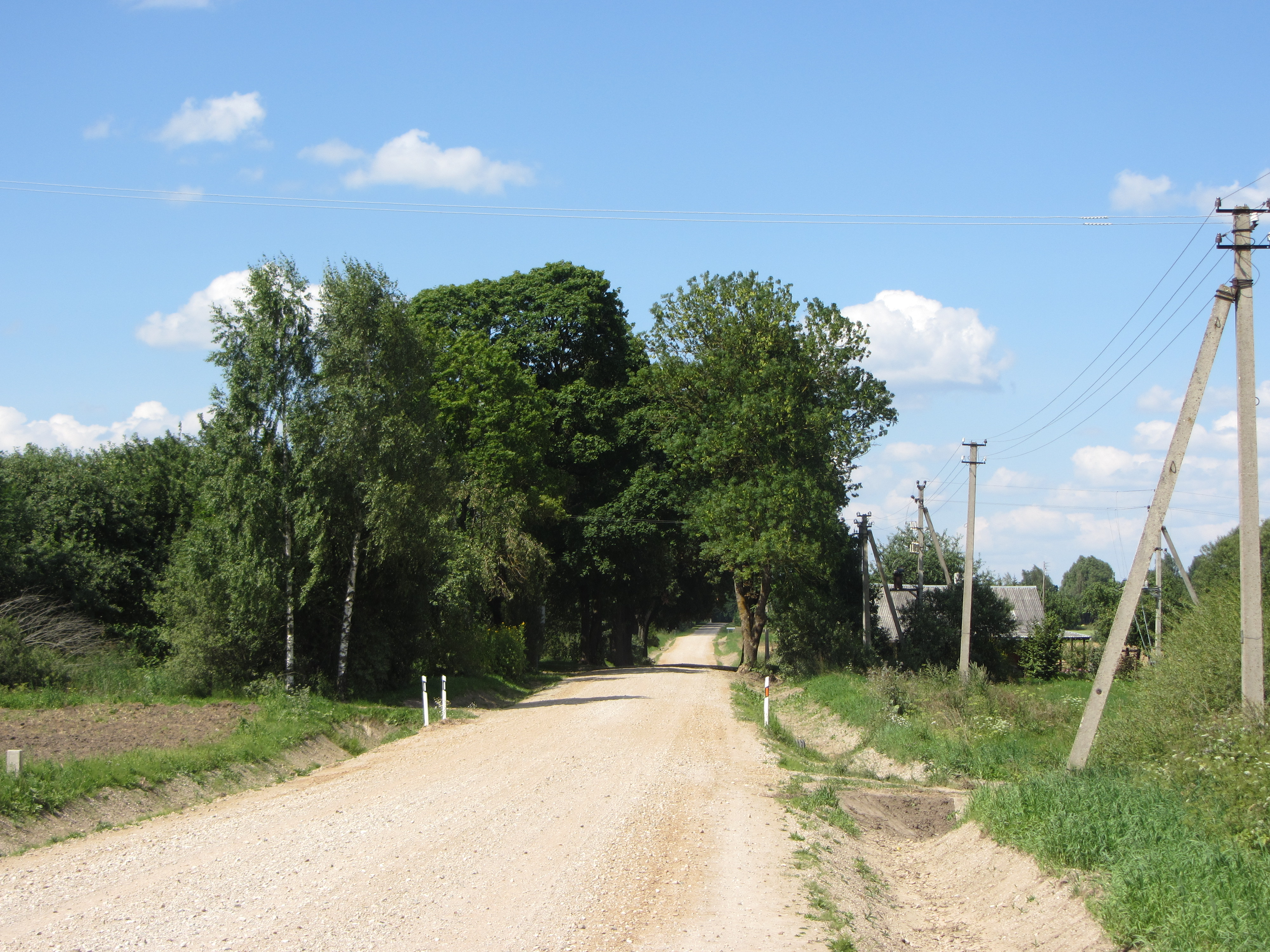 Bagaslaviškis, Lithuania